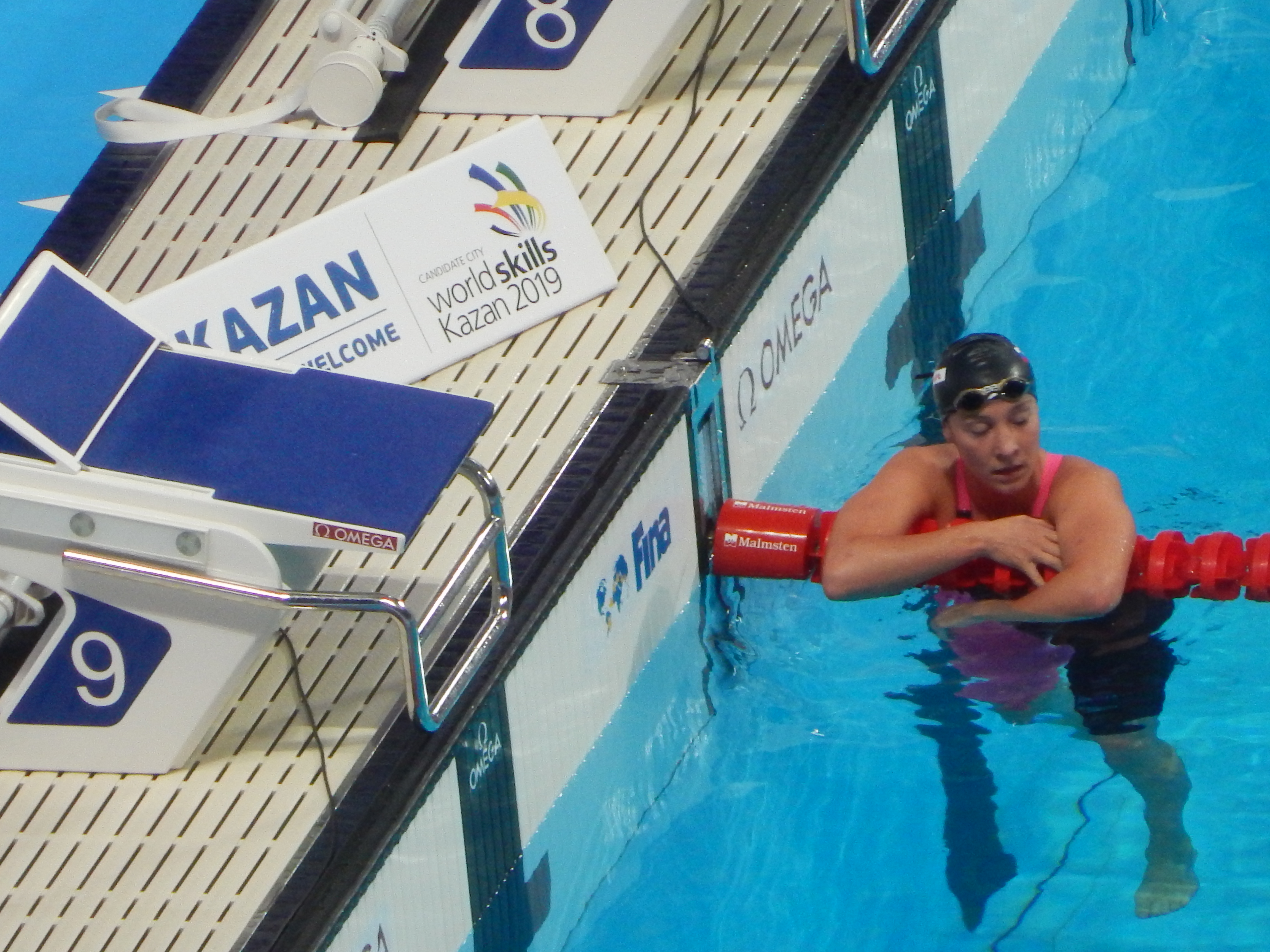 Аня Клинар на чемпионате мира в Казани в полуфинале 200м баттерфляем